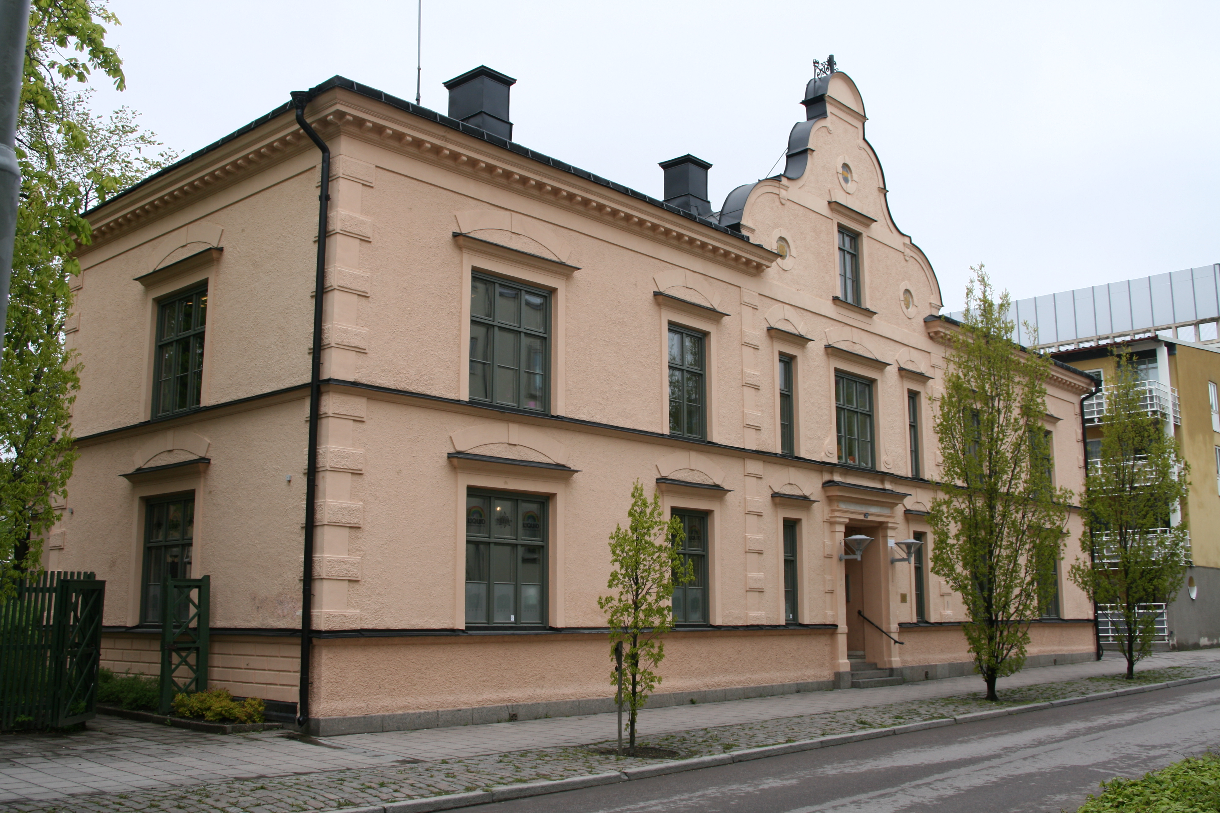 Arbis, arbetarnas teater, Linköping, från sydost